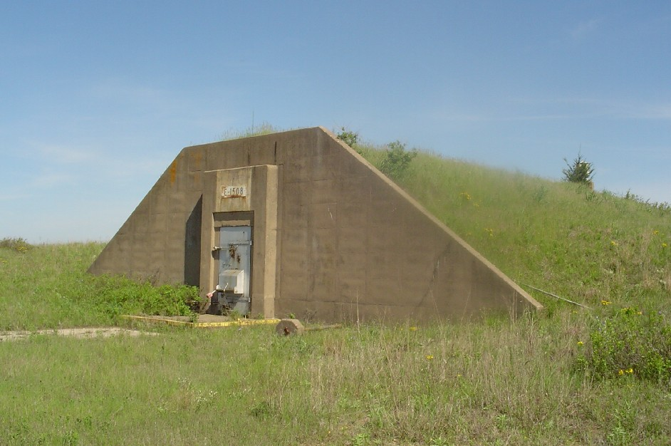 Dépot munitions : igloo de stockage modèle américains.